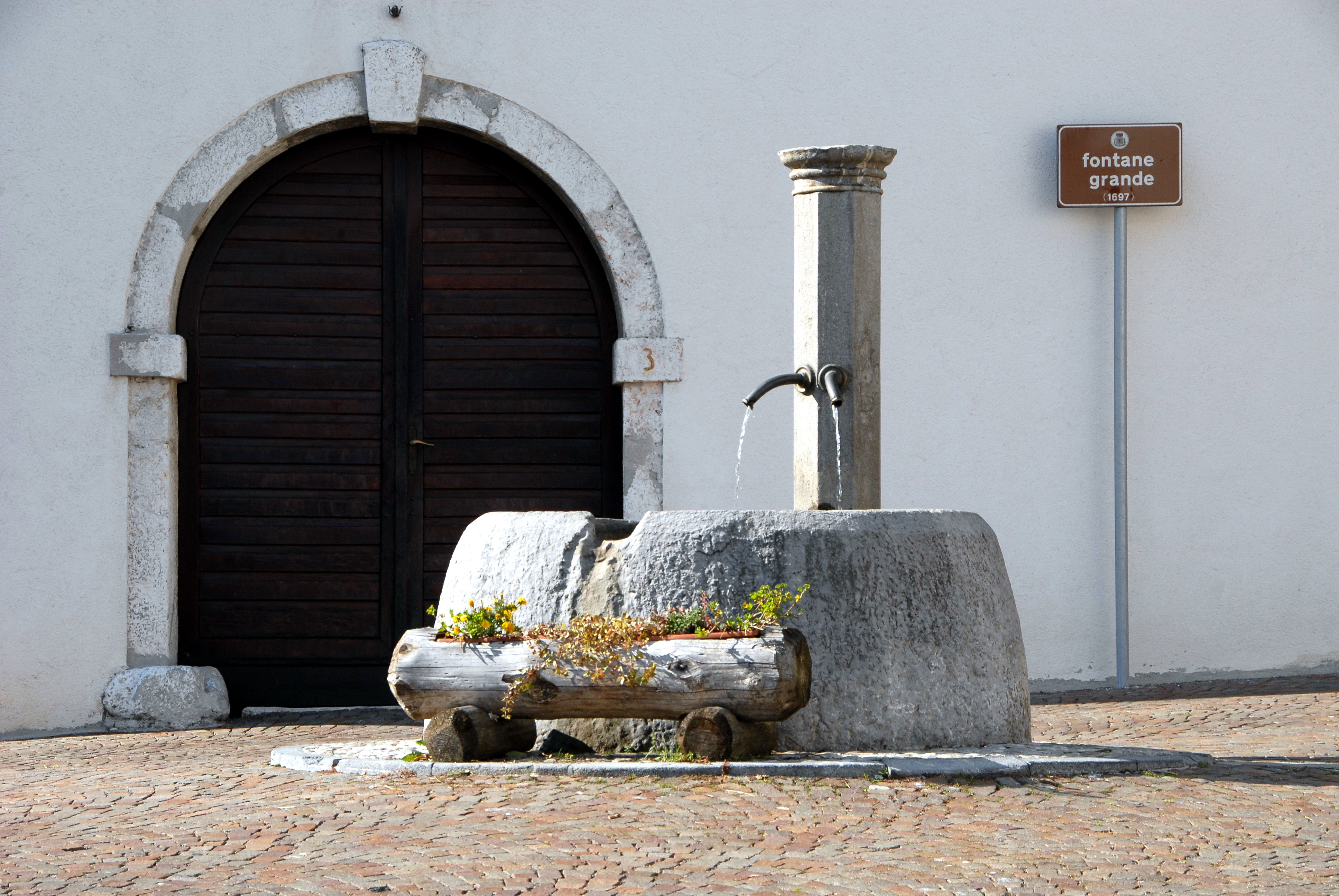 Fontane grande (2697) in the community Amaro, region Friuli Venezia-Giulia, Italy